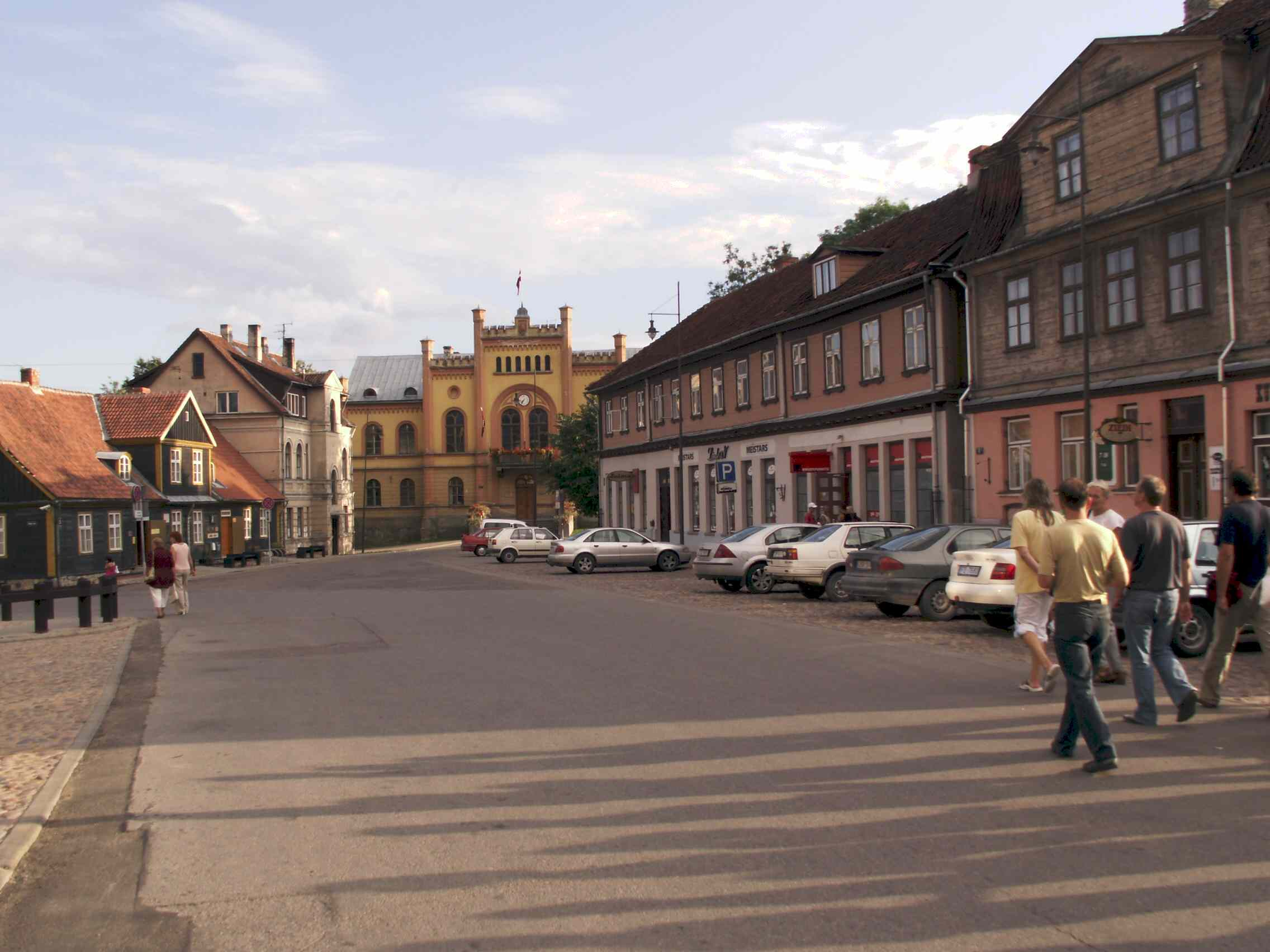 Kuldyga (seniau – Kuldinga; latviškai: Kuldīga, vokiškai: Goldingen) – miestas Latvijos vakaruose